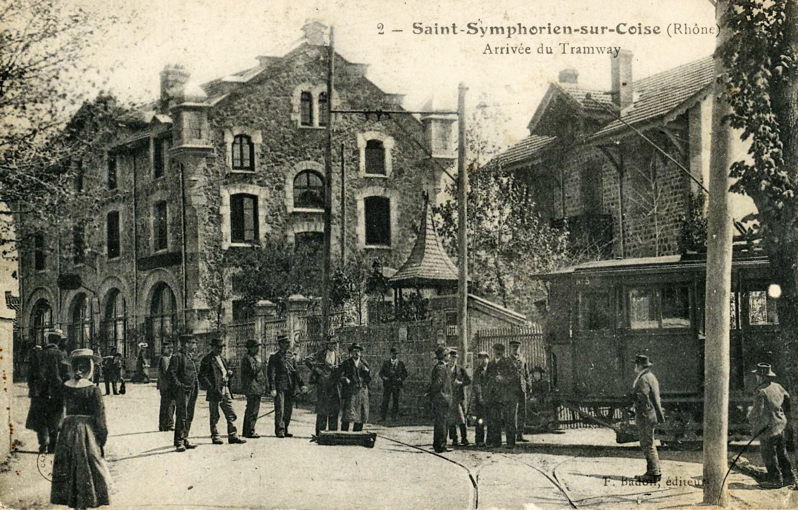 Carte postale ancienne éditée par Badoiln n°2 :Saint-Symphorien-sur-Coise - Arrivée du tramwayTramways électriques de Viricelles-Chazelles à St Symphorien-sur-Coise et extentions